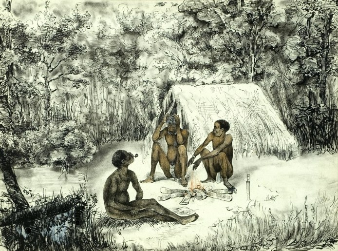 Trois esclaves marrons, près de leurs habitation.